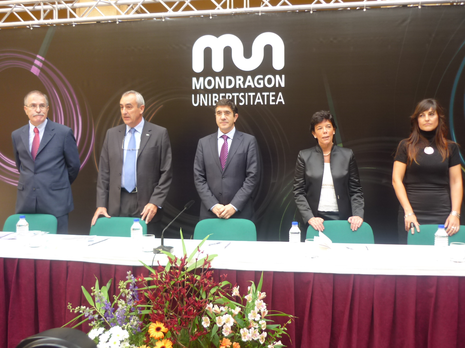 Apertura del curso 2009-1010 de la Universidad de Mondragon-Mondragon Unibertsitatea. De izquierda a derecha: Javier Sotil (presidente de Mondragon Unibertsitatea y representante de Mondragón Corporación), Iosu Zabala (rector de Mondragon Unibertsitatea), Patxi López (lehendakari del Gobierno Vasco), Isabel Celáa (Consejera de Educación, Universidades e Investigación) e Idioa Peñacoba (Secretaria General de Mondragon Unibertsitatea).